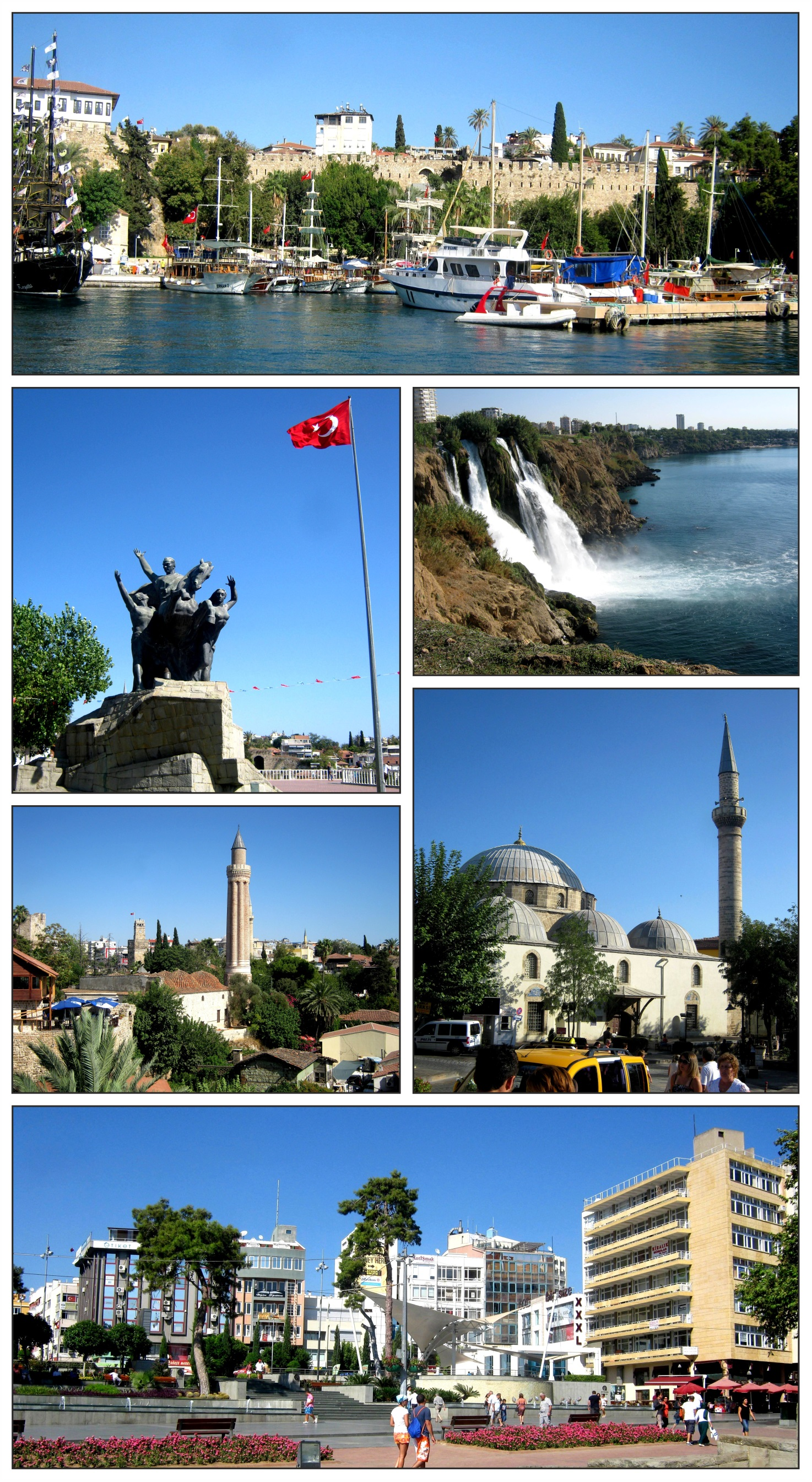 Коллаж из фотографий собственной съёмки.